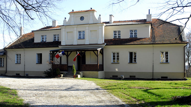 Muzeum Napoleońskie w Witaszycach